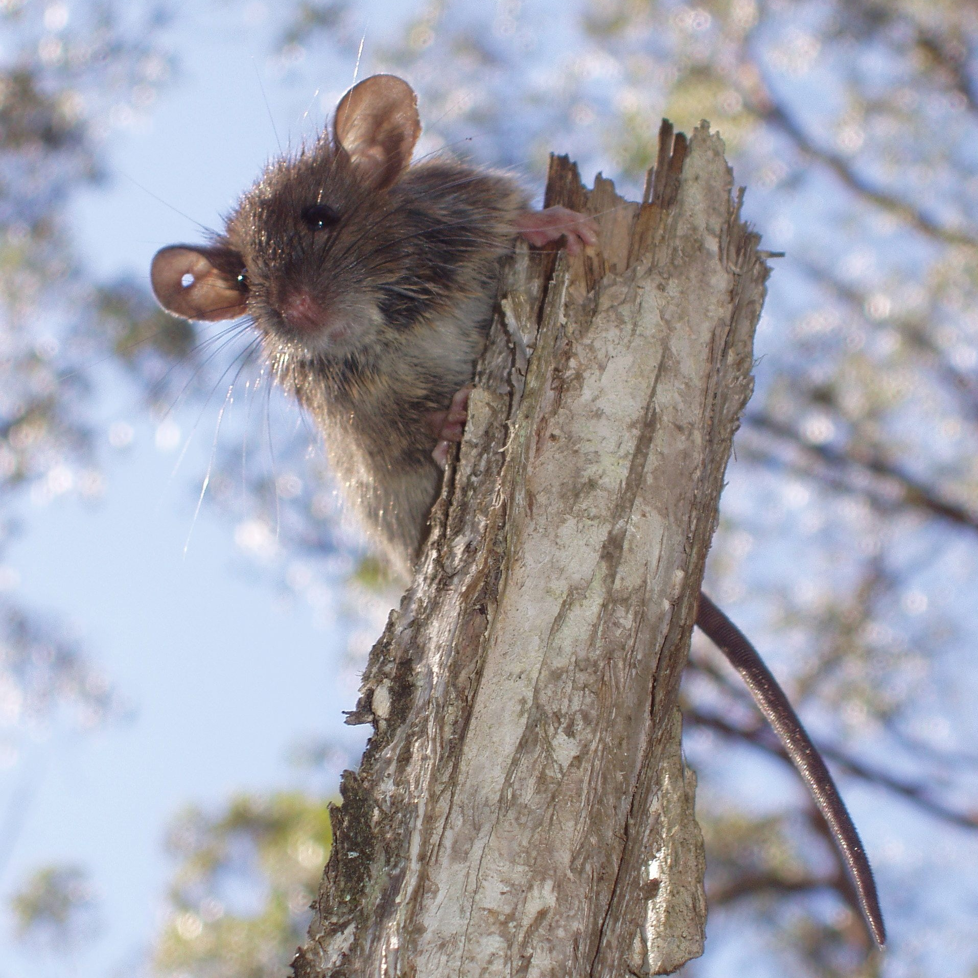 Buschratte (Rattus fuscipes), (picture taken close to Bemm River, Victoria)